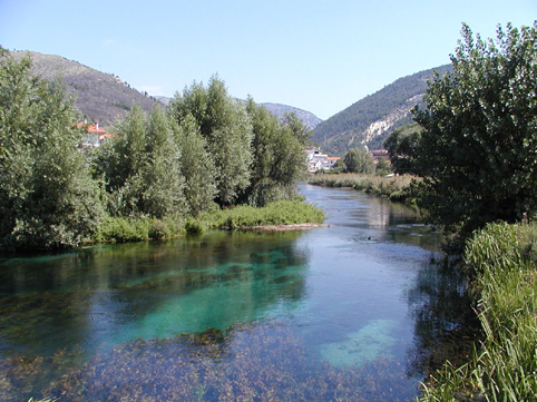 Der Fluß dicht an der Quelle